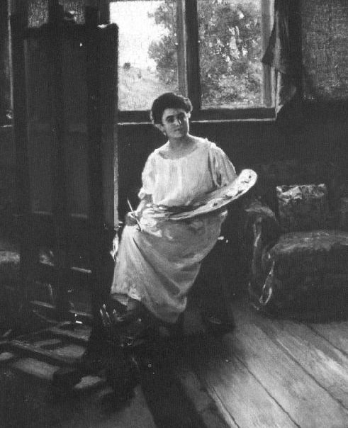 Karola Skutecká-Karvašová (1893- 1945), Slovenská malířka židovského původu.